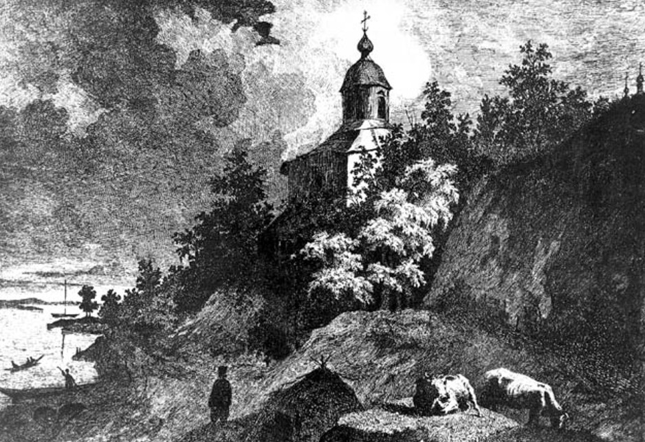 Het Vidubetsky Klooster. Serie Pittoresk Oekraïne, ets uit 1844.